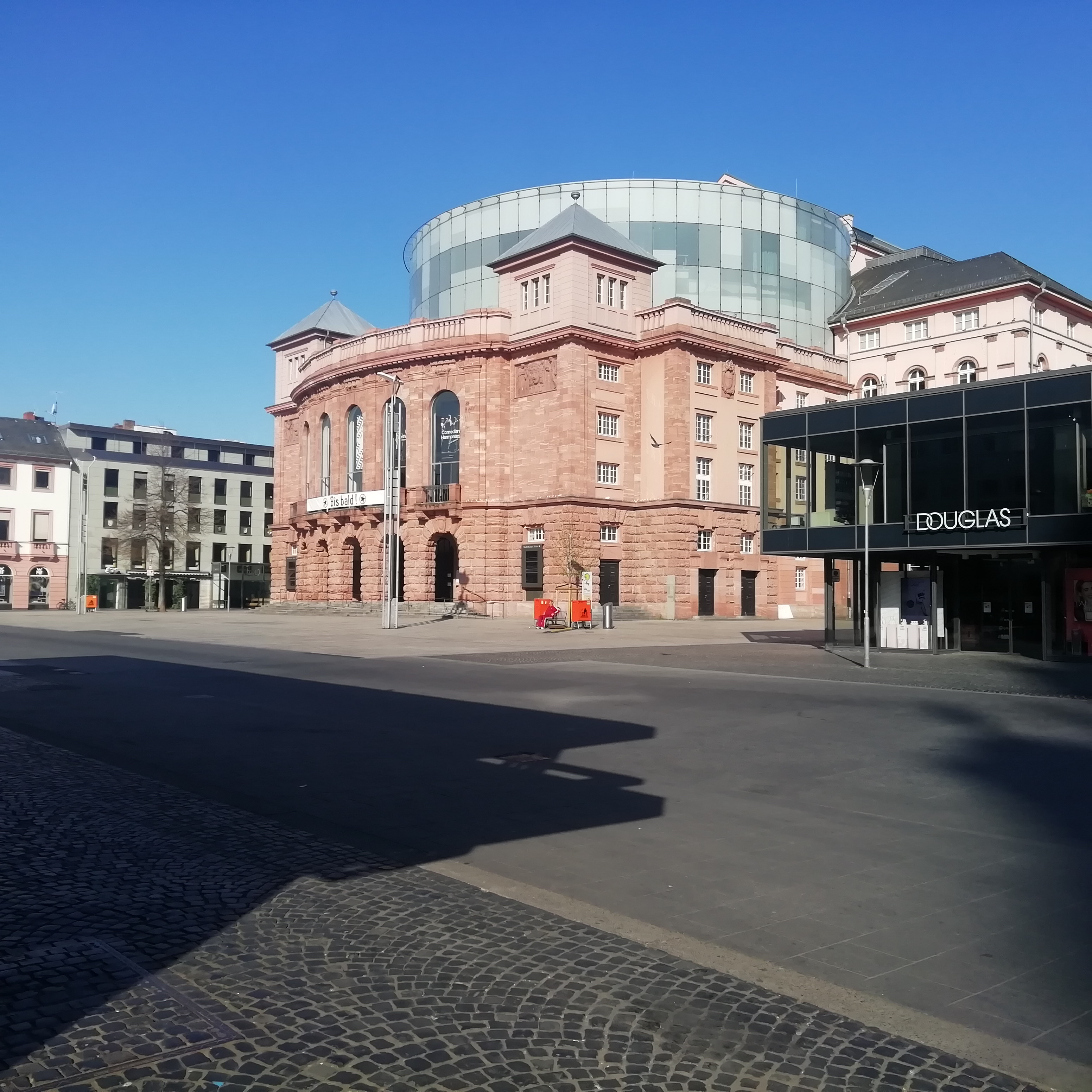 Auswirkungen des Kontaktverbots: Menschenleerer Theaterplatz in Mainz; Karfreitag, der 10.04.2020